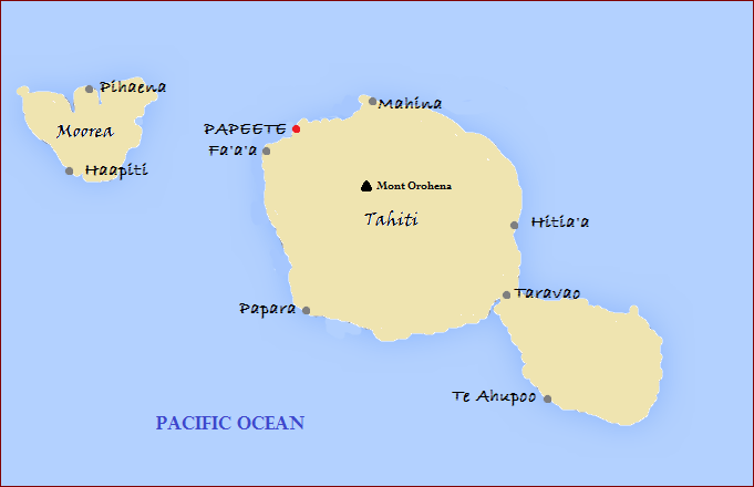 Manis paša zīmēta Taiti un Moorea salu karte.